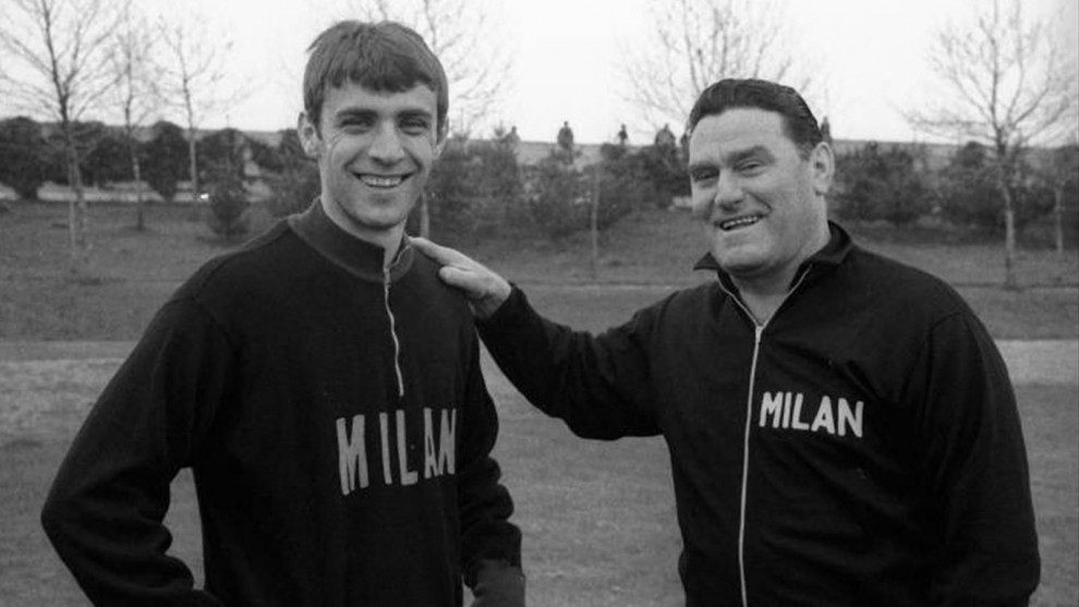 Da sinistra: il calciatore Pierino Prati e il tecnico Nereo Rocco in allenamento al Milan nella stagione 1967-68.